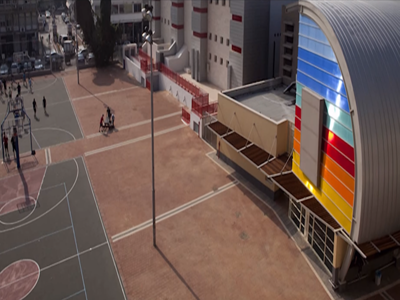 מבנה הספורט של תיכון עירוני א' לאמנויות